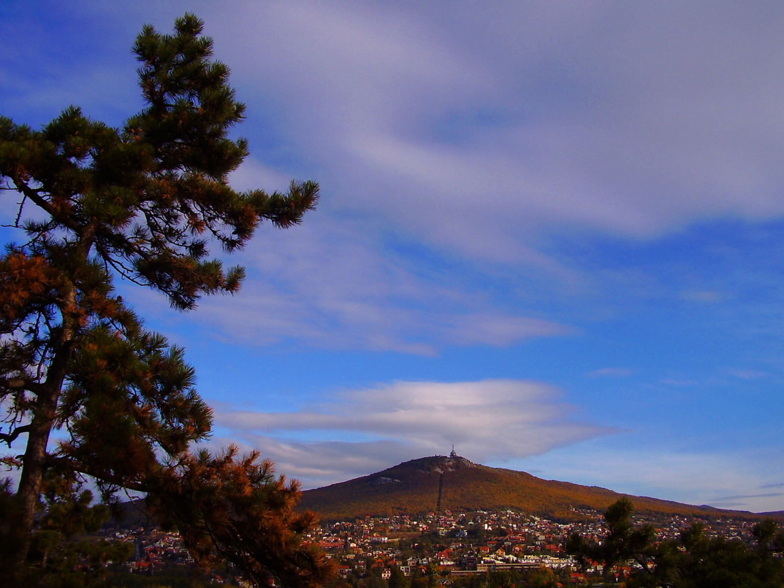 Zobor.